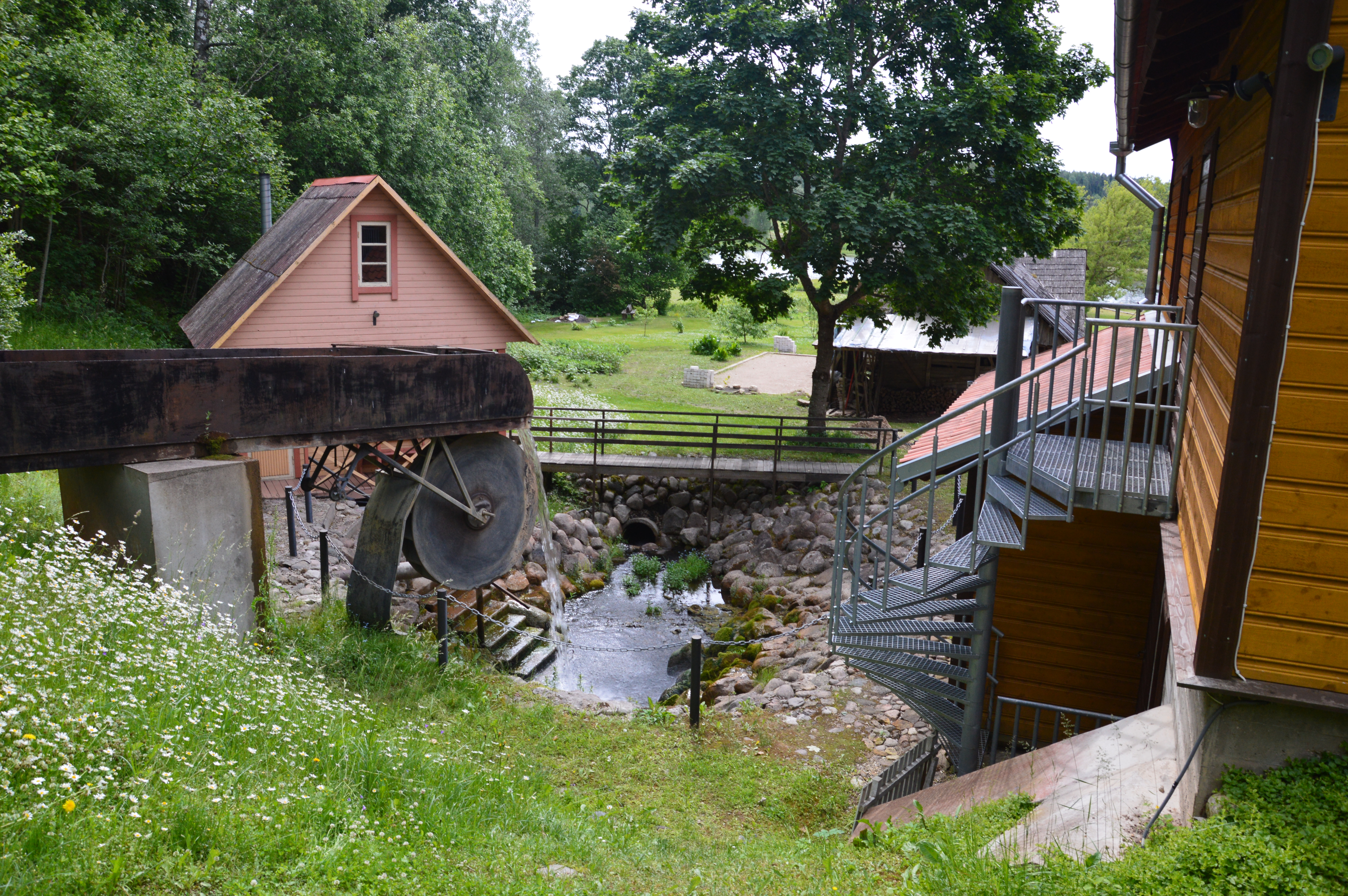 Ööbikuoru hüdrotöökoda-muuseum